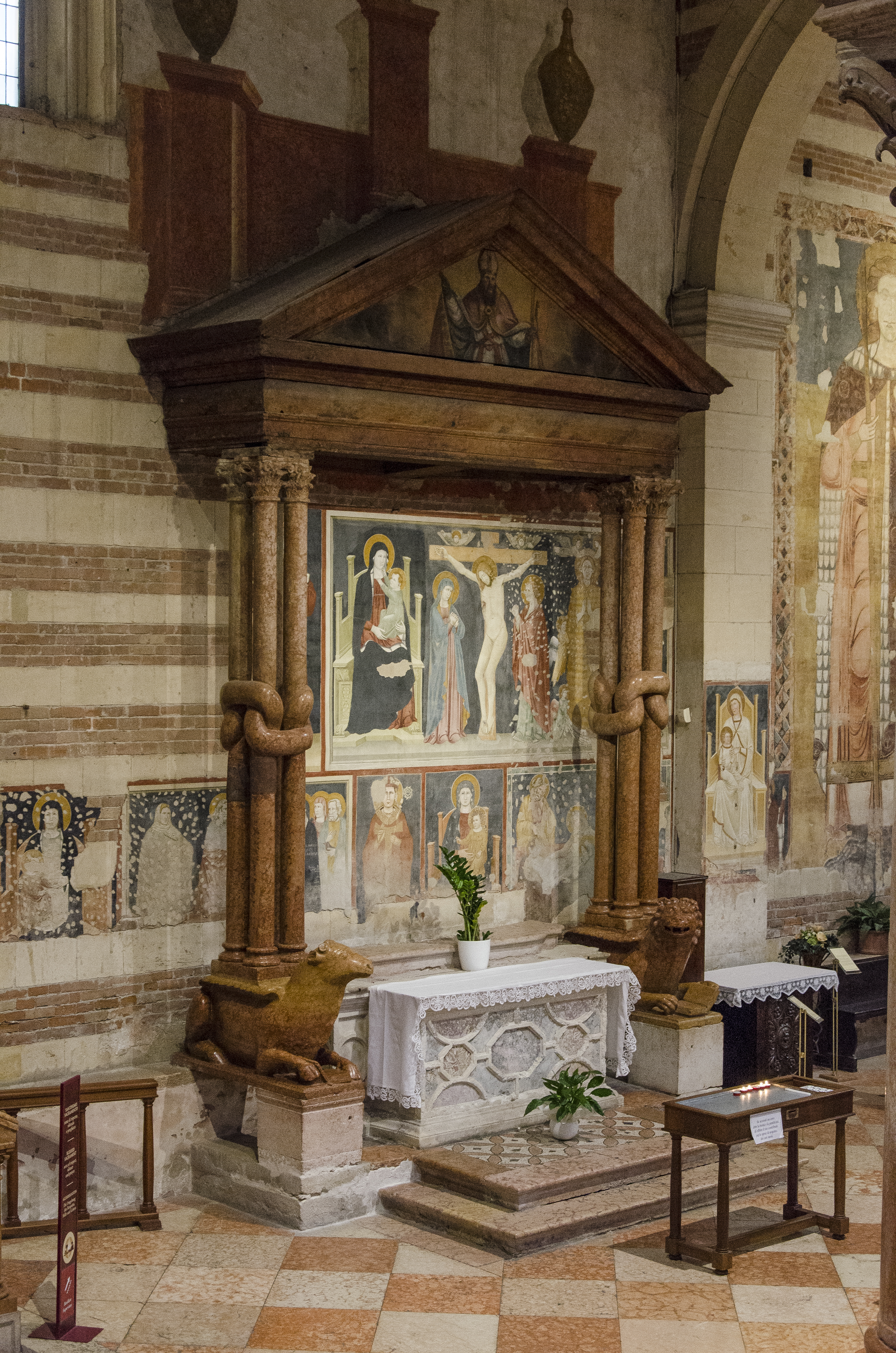 Foto degli interni della chiesa